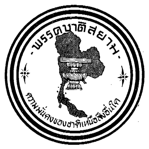 ตราสัญญลักษณ์ พรรคชาติสยาม (2519)